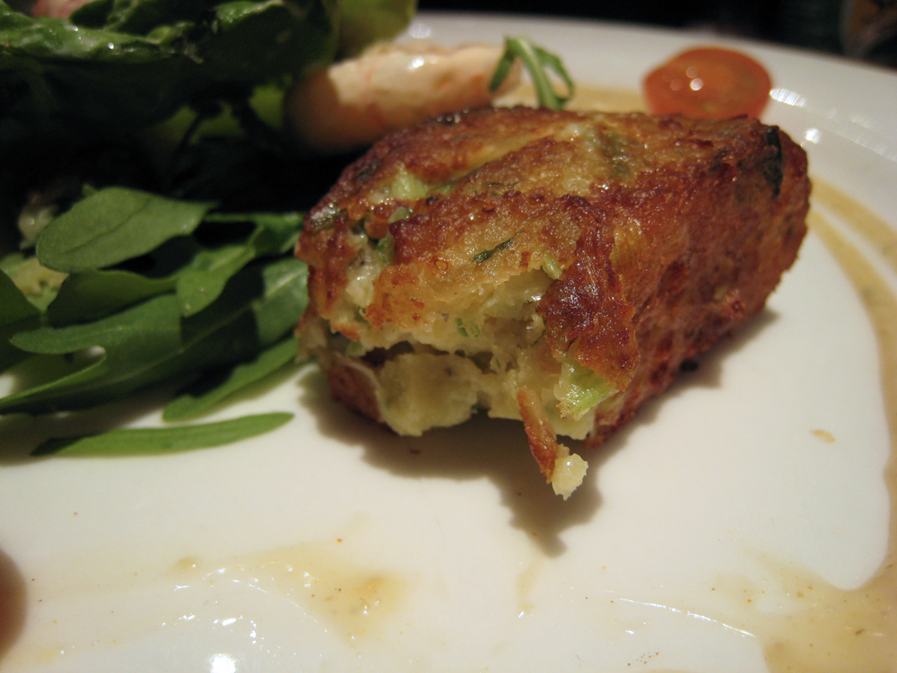 Glamorgan - vegetarian sausage